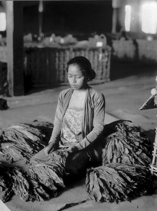 Foto. Arbeidster sorteert tabak op lengte en kleur, Java.